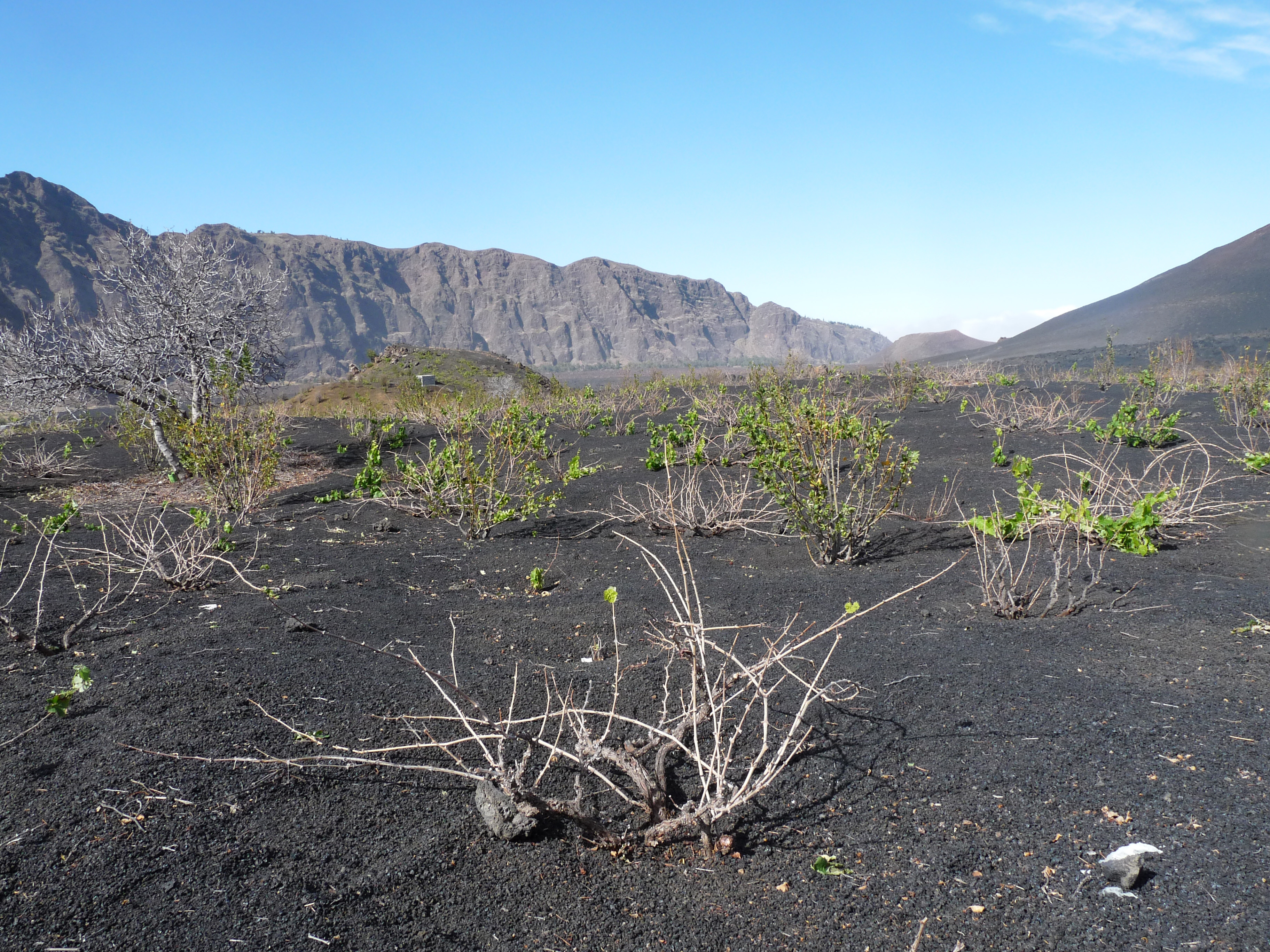 Chã das Caldeiras (île de Fogo, Cap-Vert) : vigne sur les flancs du volcan ; pois à l'arrière-plan